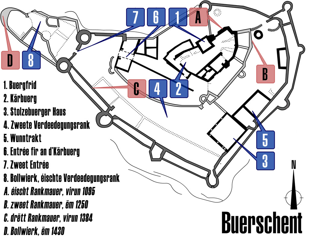 Plang vun der Buerg Buerschent